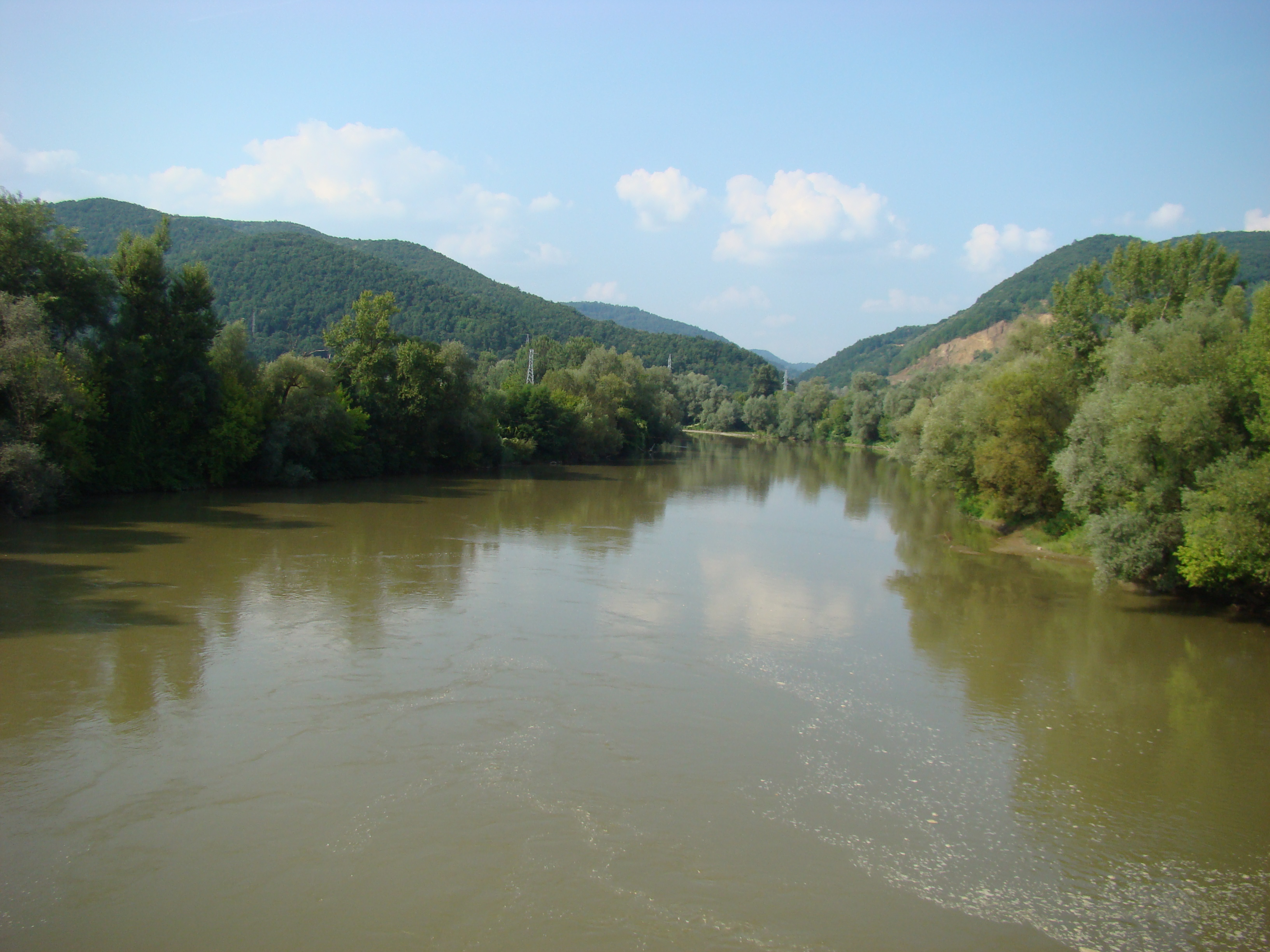 Biserica de lemn din Sălciua